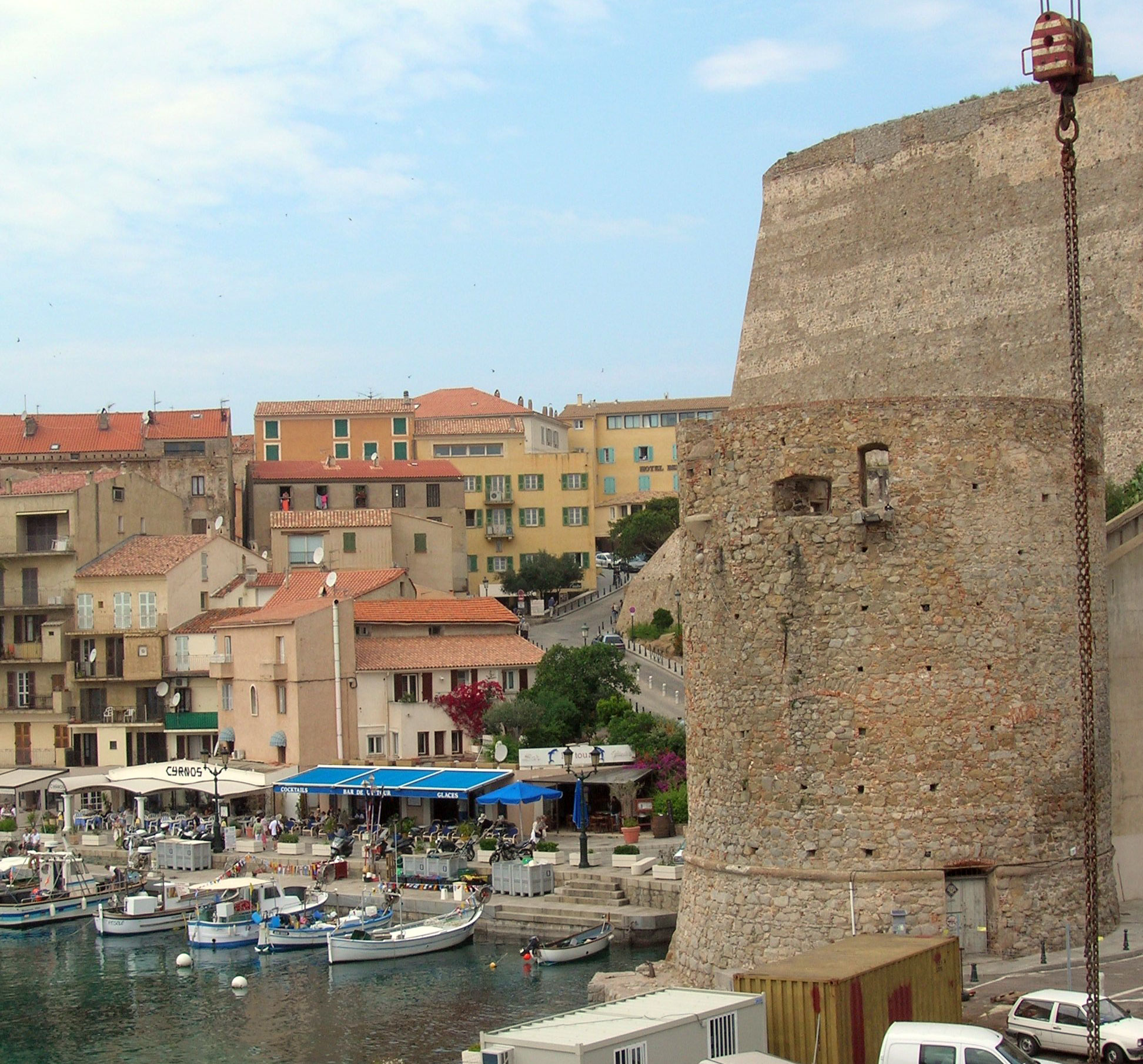 Den Tuerm vun der Zitadell zu Calvi Source:Eege foto vum User:ernmuhl Lizenz